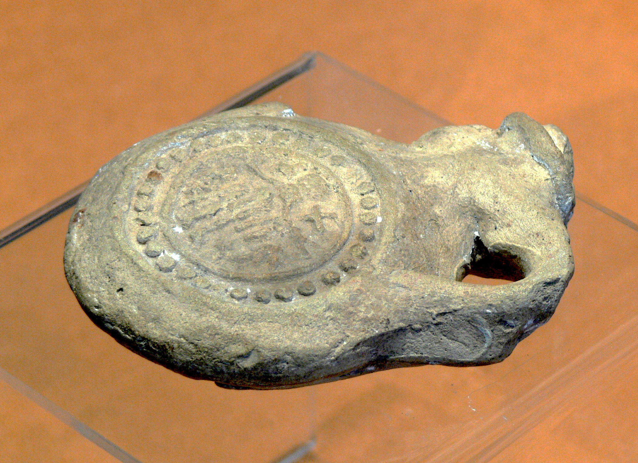 Ampoule de saint Ménas découverte à proximité de l'église paléochrétienne de Chassey-lès-Montbozon. Vesoul, musée Georges-Garret